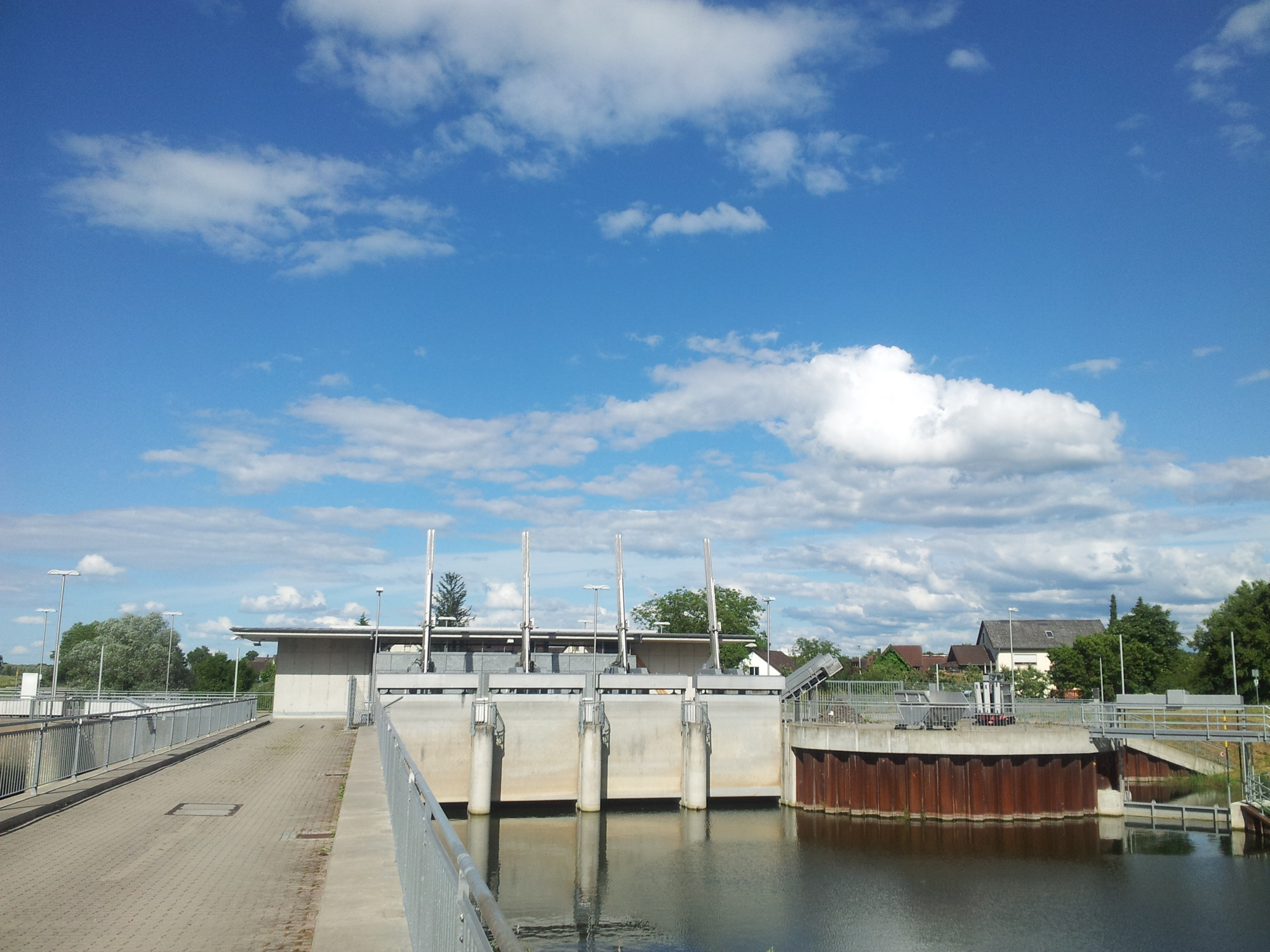 Acherschoepfwerk bei Greffern